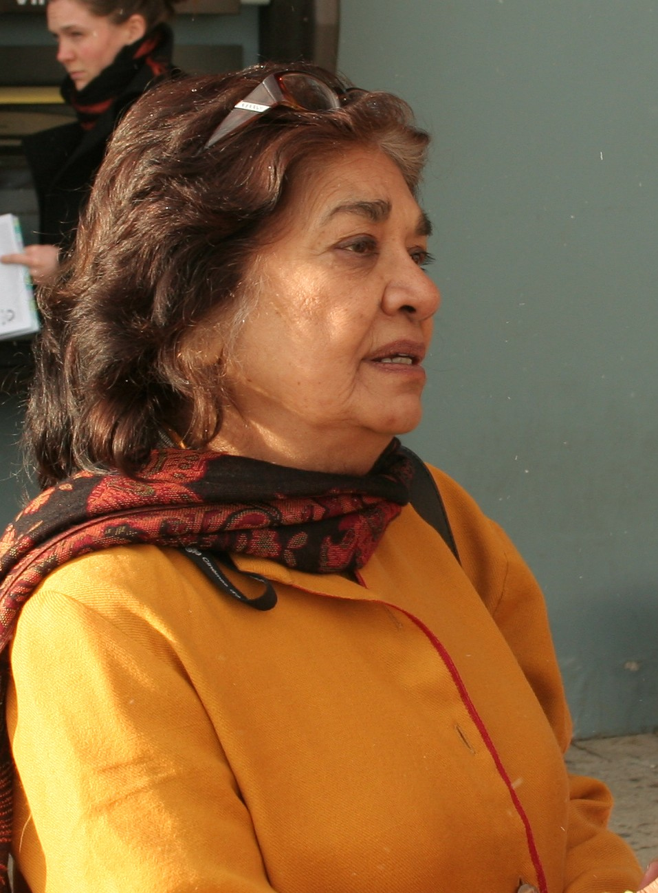 Aruna Vasudev, Festival international des cinémas d'Asie 2010, Vesoul, France